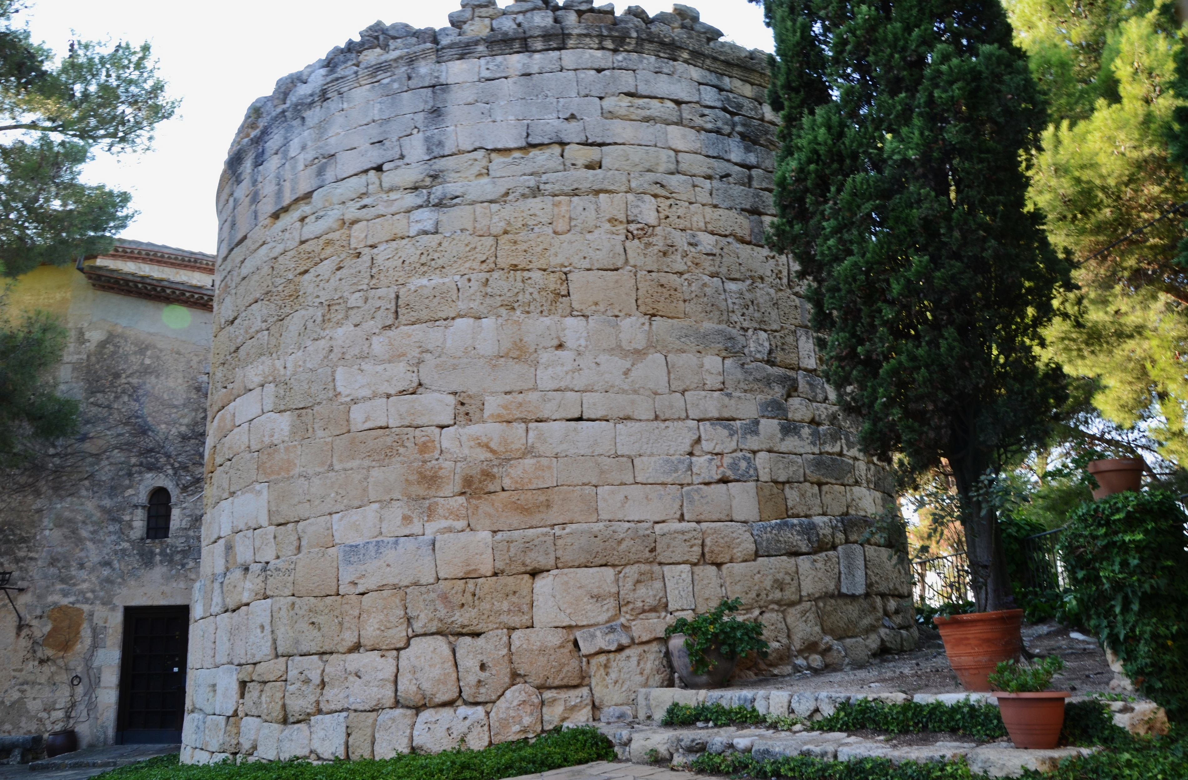 Torre de les Gunyoles (Avinyonet del Penedès)